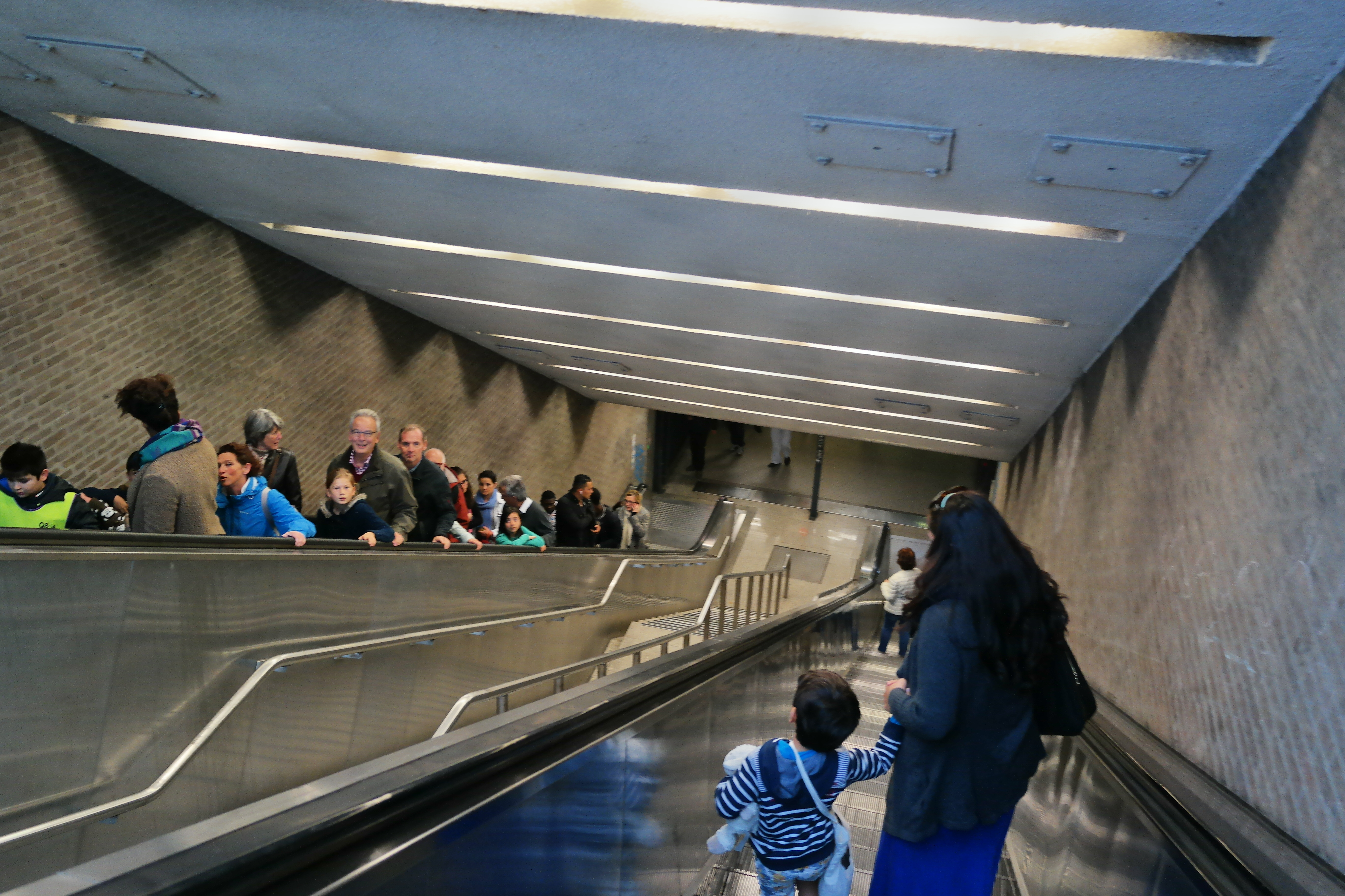 Het premetrostation Van Eeden in Antwerpen.